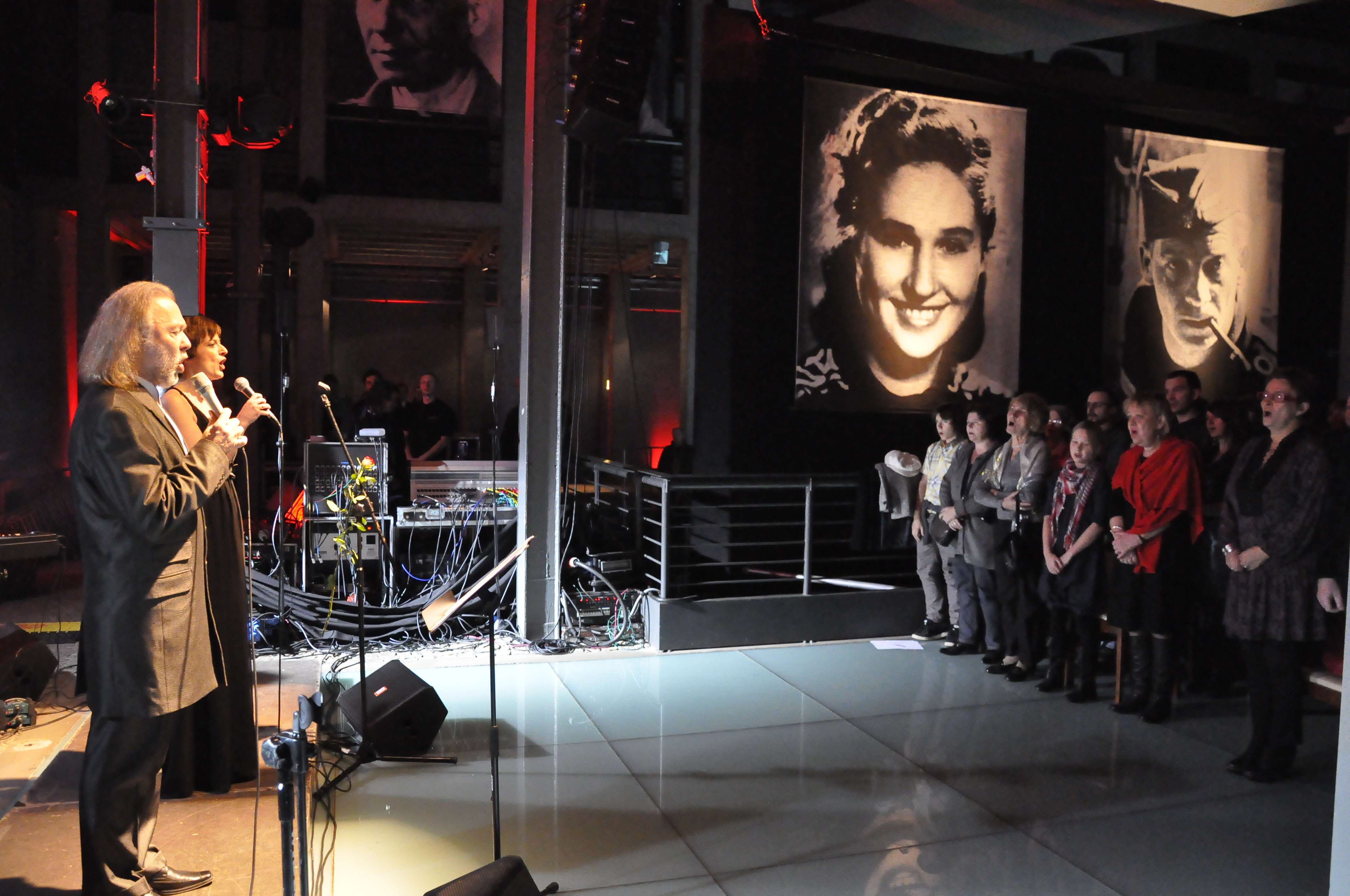 Artyści i publiczność II Koncertu Niepodległosci w trakcie wykonania Mazurka Dąbrowskiego